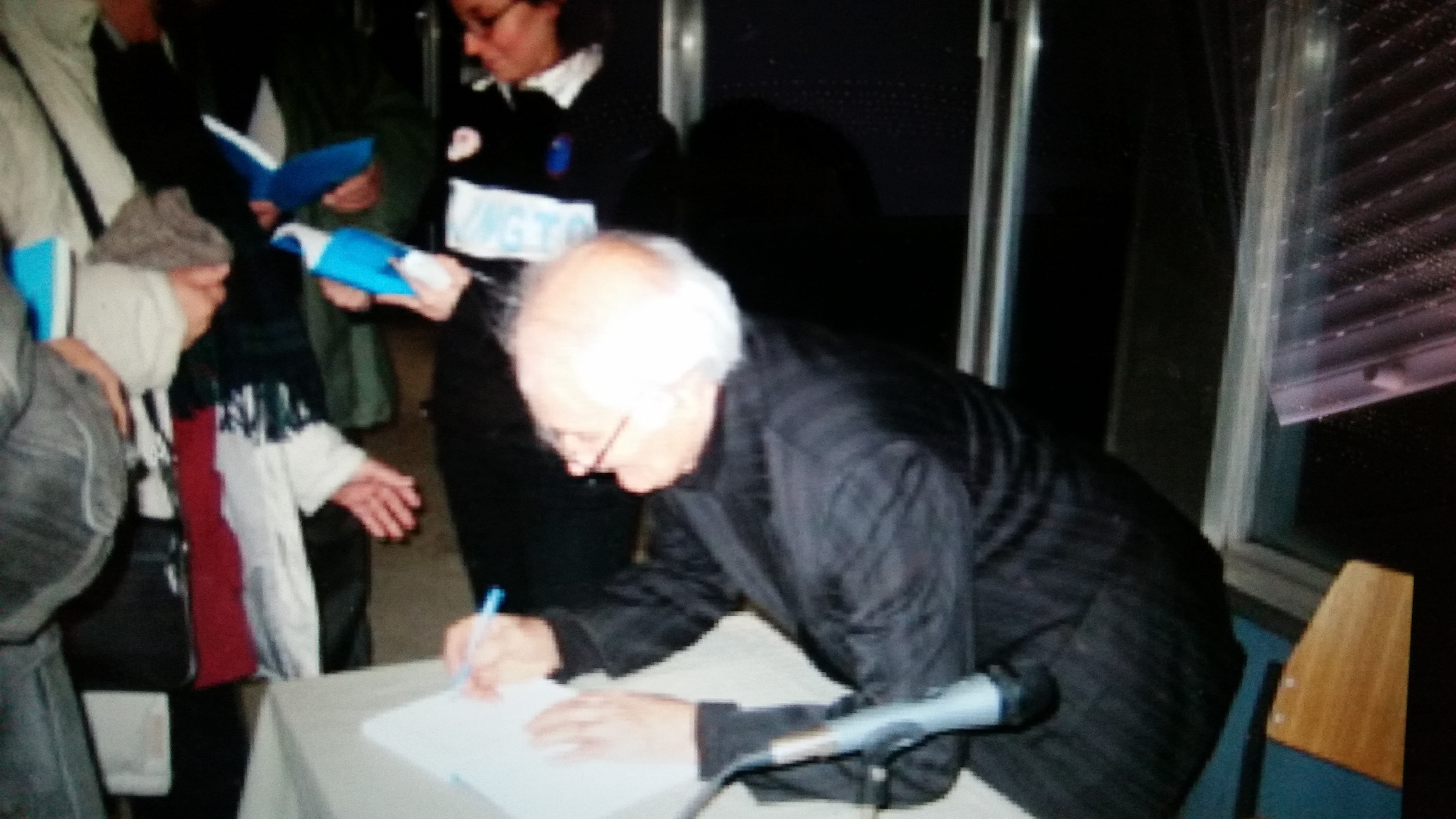 Књижевно вече 2006.године